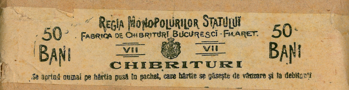 Etichetă de chibrituri a Regiei Monopolurilor Statului, România, aprox. 1920-1930